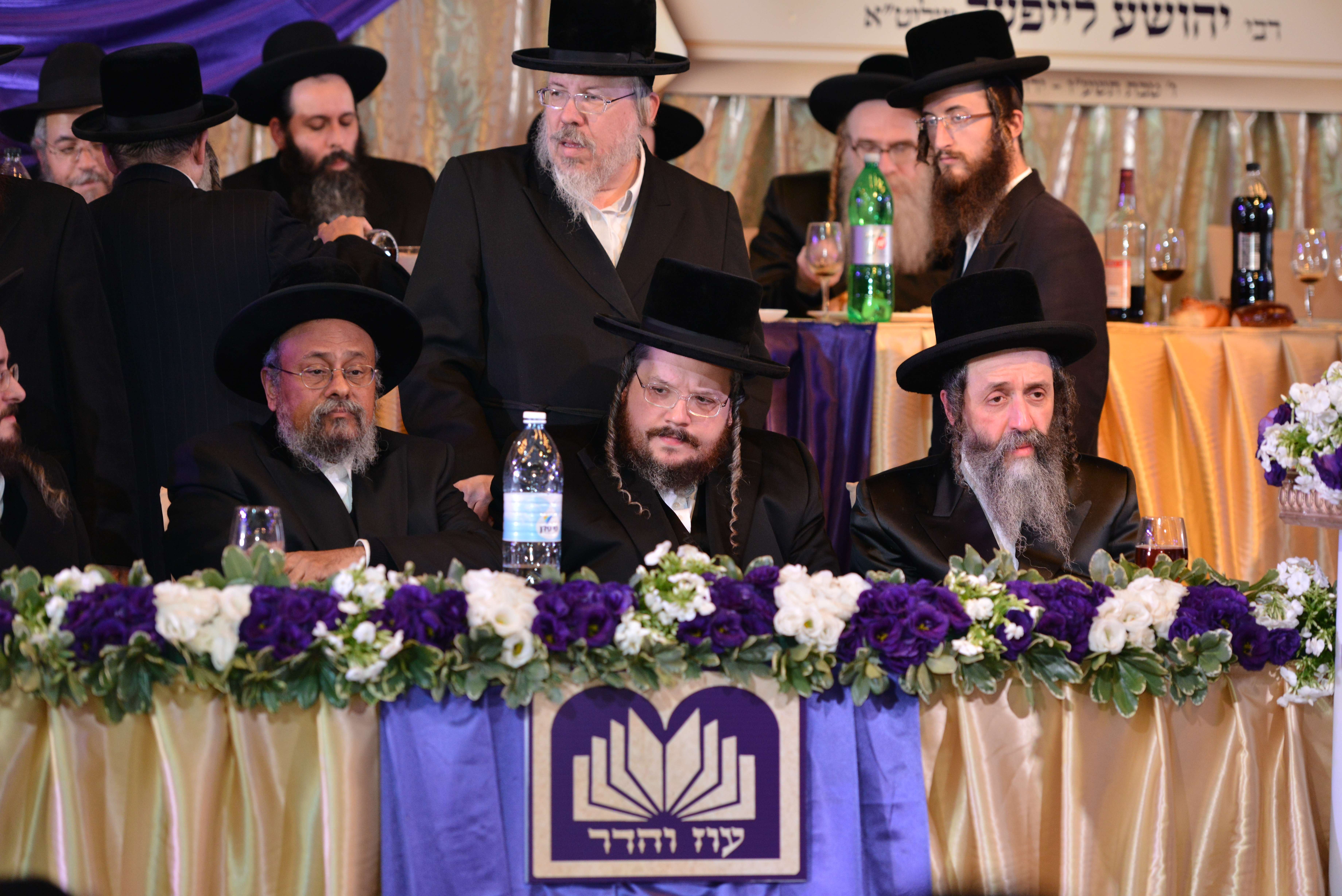 הרב יהושע לייפער, הרב אהרן מרדכי רוקח, הרב אבנר עפגין